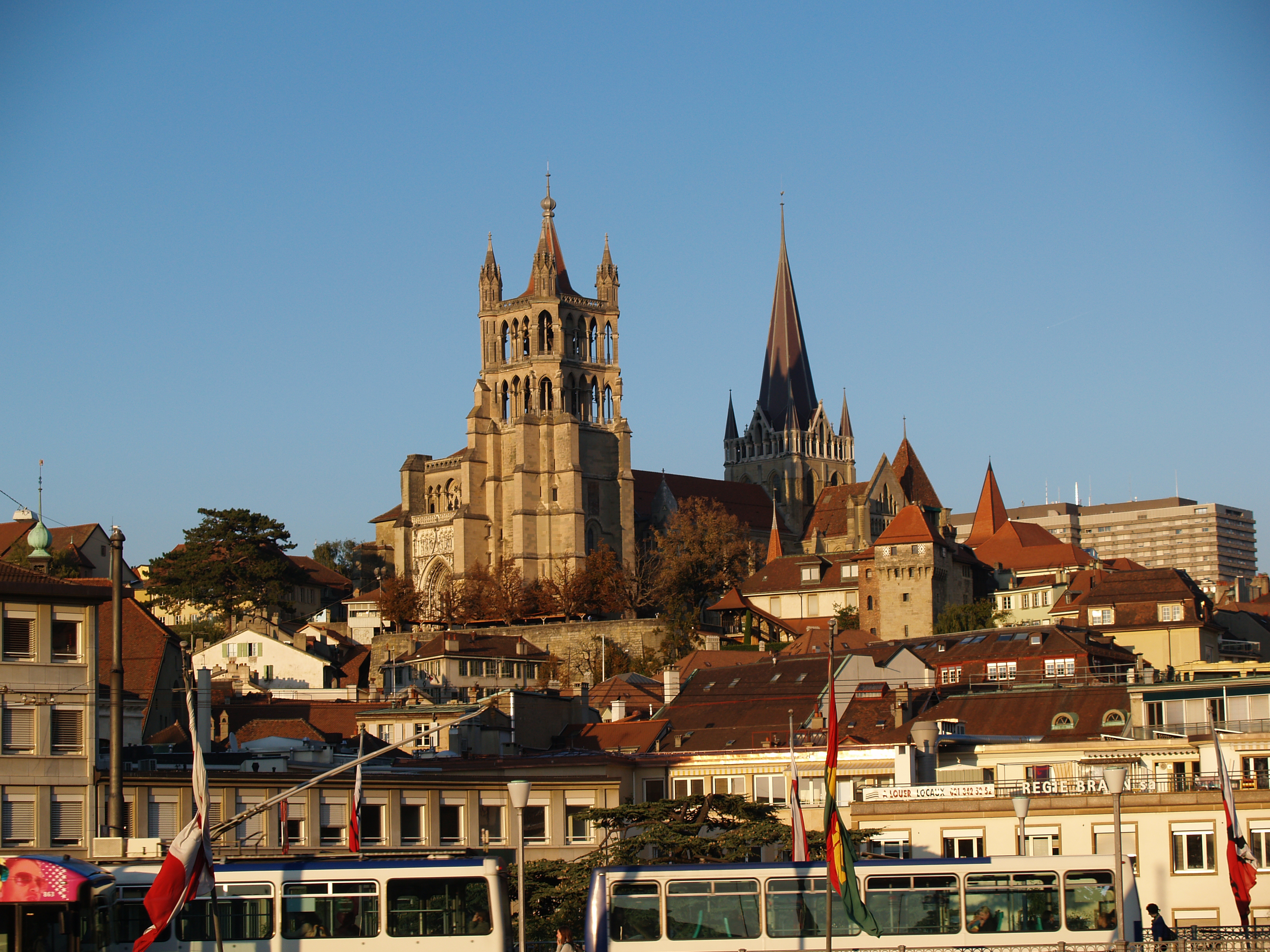 Vue de la Cathédrale de Lausanne depuis le Grand-Pont